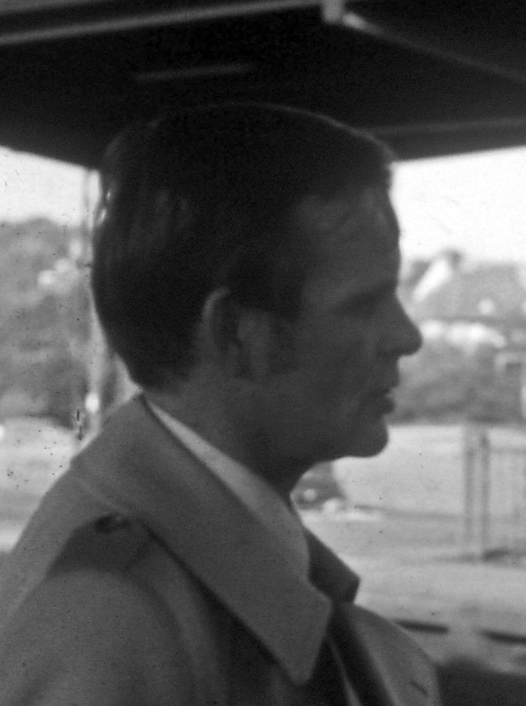 Professor Günter Schmidt bei einer Exkursion mit einer Gruppe von Studenten des Fachgebiets Regelungstechnik der TU München im Herbst 1979